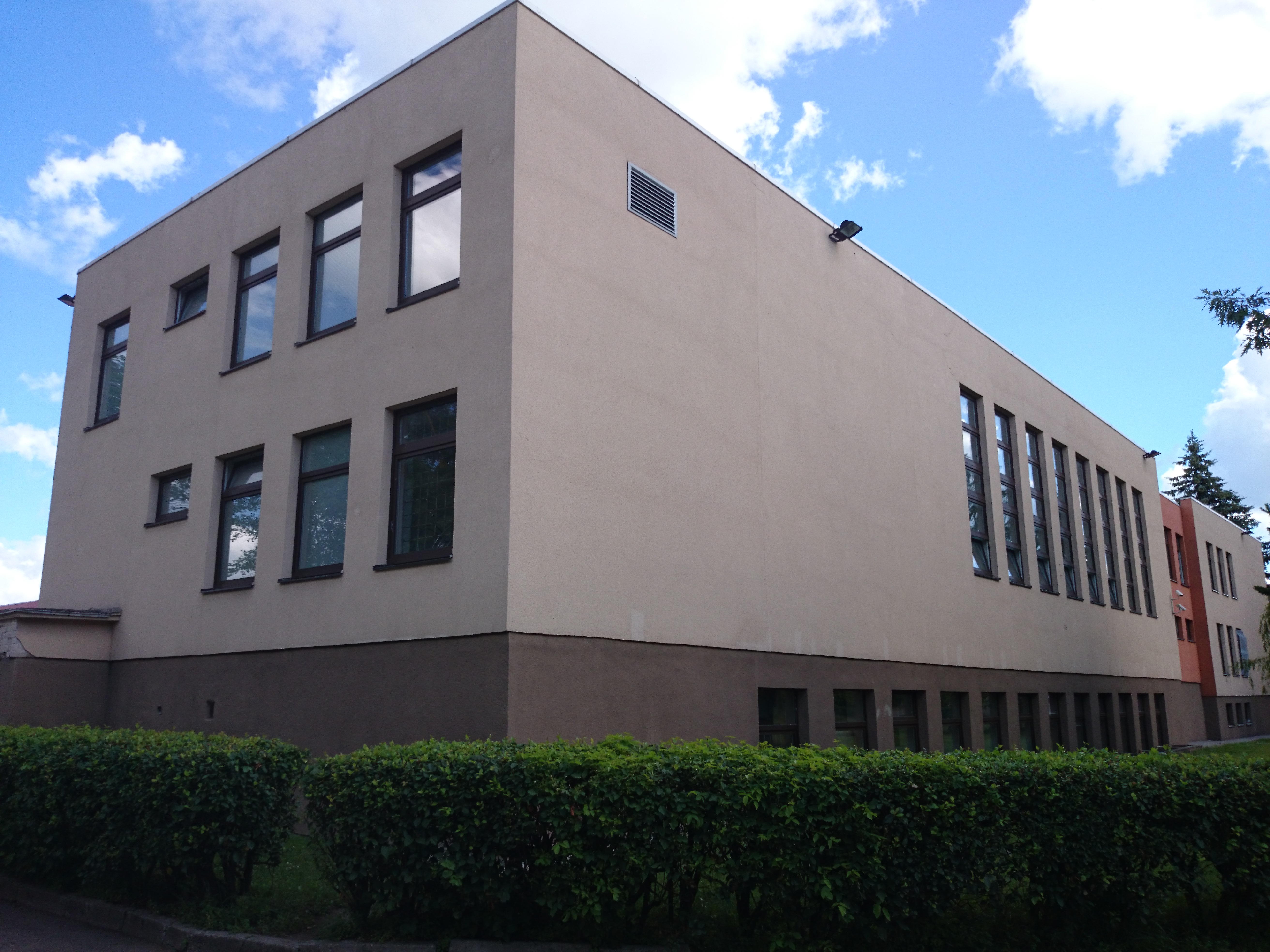 Lietavos pagrindinė mokykla